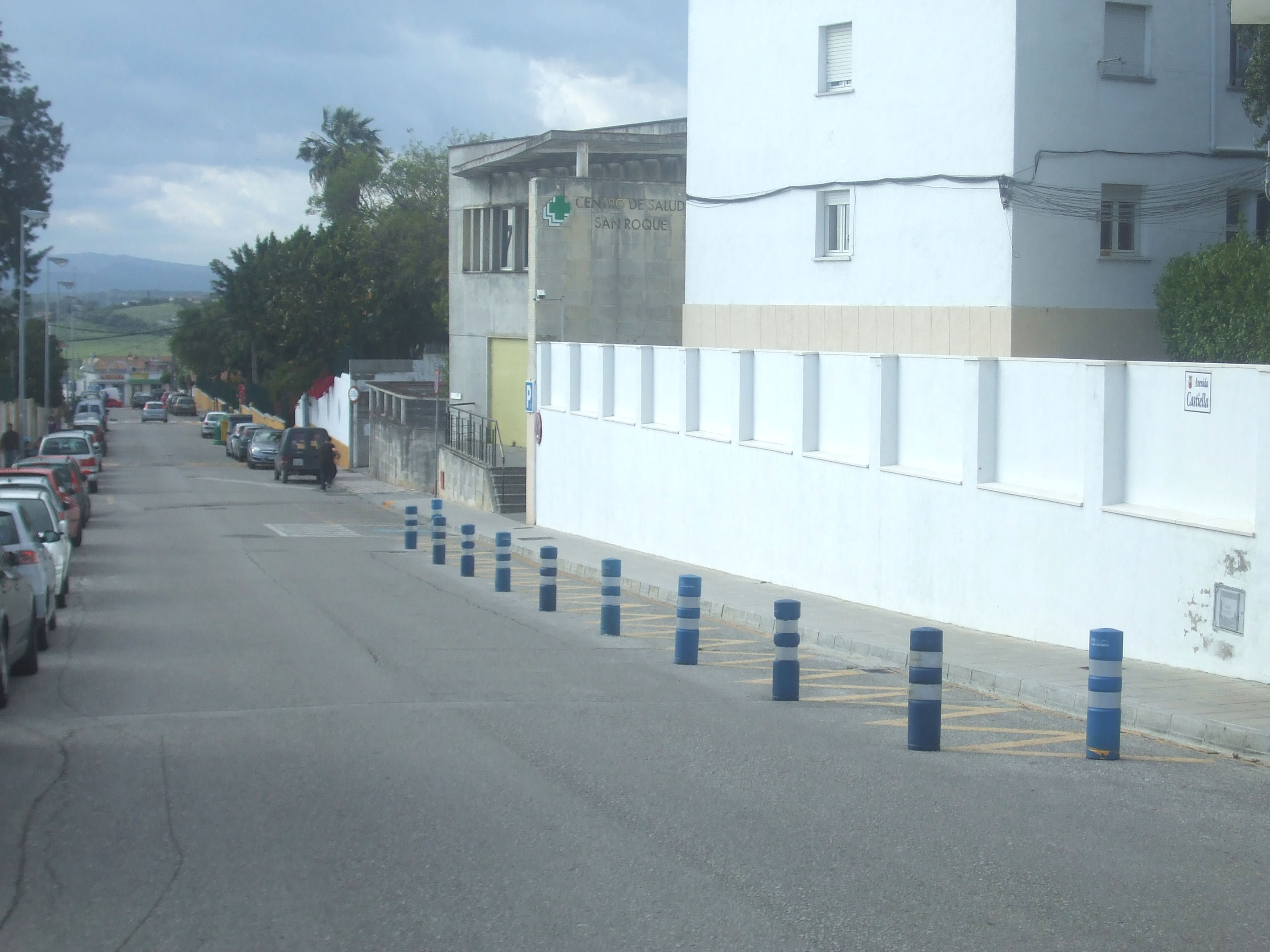 Avenida Castiella, San Roque.